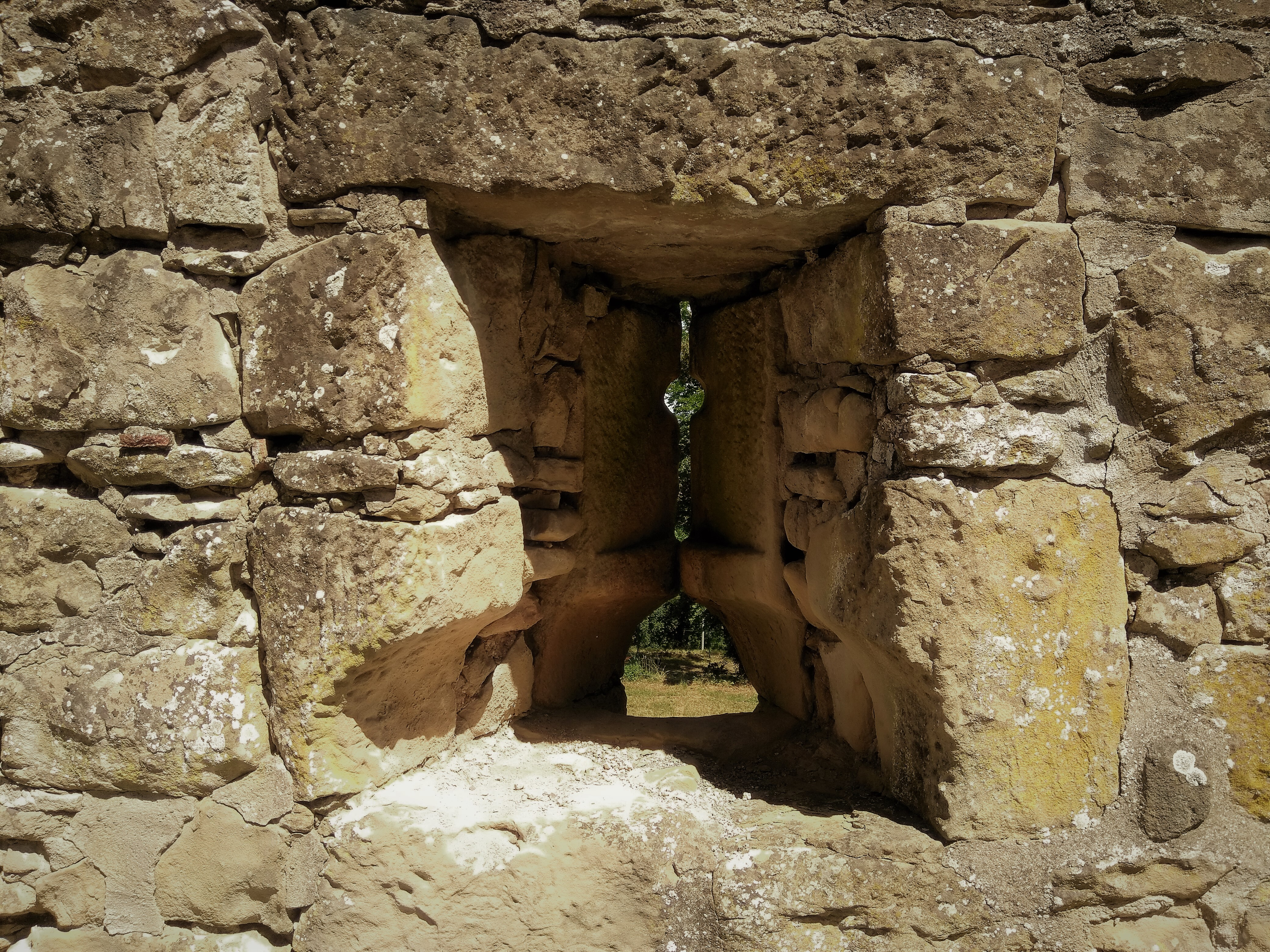 Vaade eeslinnuse zwingerimüüri laskeavale lõunasuunast.